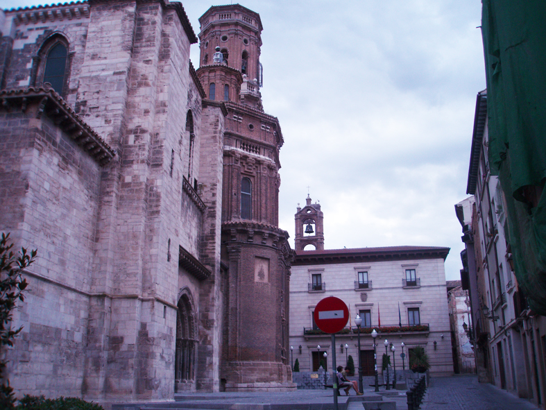 Plaza Vieja (Tudela), en 2007